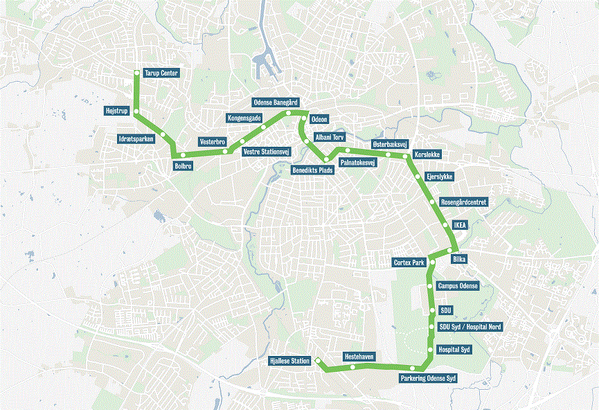 Kort over Odense Letbanes linjeføring